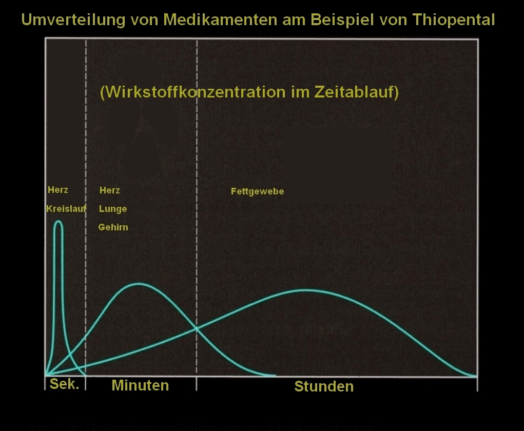 Pharmakokinetik von Thiopental, angelehnt an: Franz-Josef Kretz, Jürgen Schäffer: Anästhesie Intensivmedizin Notfallmedizin Schmerztherapie, Springer-Verlag Berlin, Heidelberg, 2013, ISBN 9783662057308